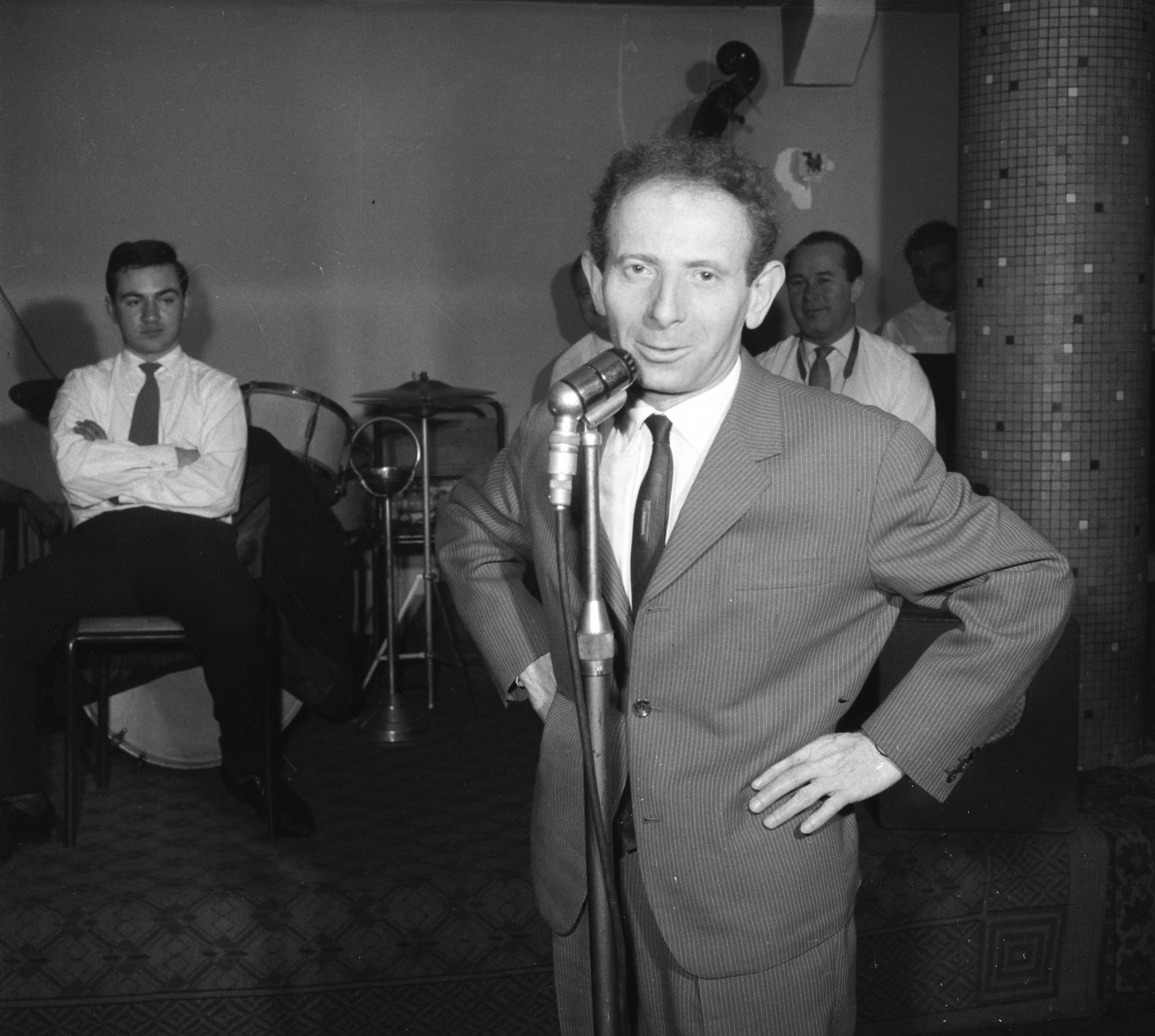 Kabos László színművész. Location: Hungary Title: Kabos László színművész.